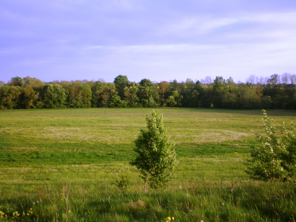 Valle de Río Šušvė en municipalidad de Kėdainiai